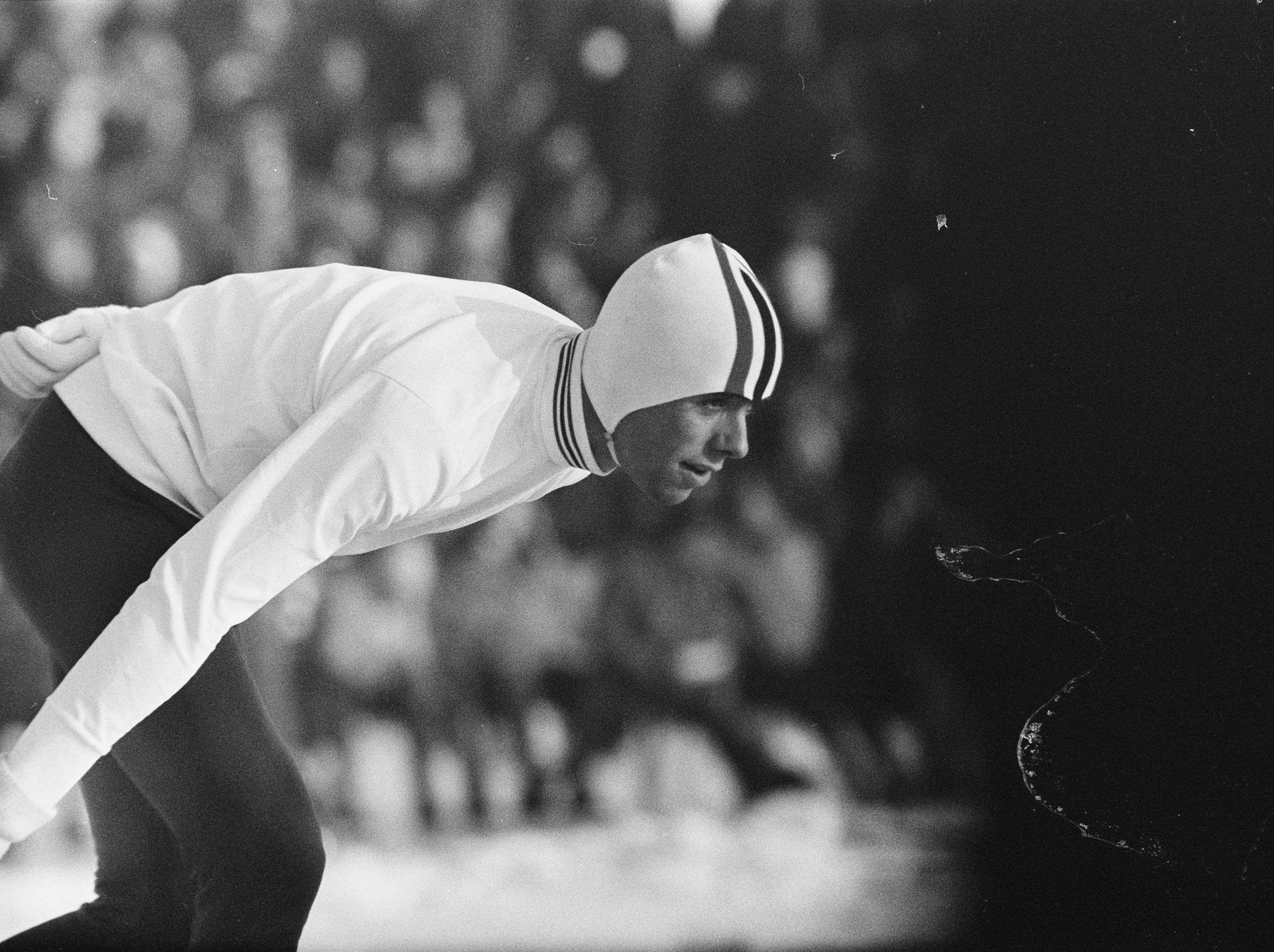 Collectie / Archief : Fotocollectie Anefo Reportage / Serie : [ onbekend ] Beschrijving : Schaatswedstrijd Nederland tegen Noorwegen in Heerenveen. Dag Fornaess in aktie Datum : 20 december 1969 Locatie : Friesland, Heerenveen, Noorwegen Trefwoorden : schaatsen, sport Persoonsnaam : Dag Fornaess Fotograaf : Koch, Eric / Anefo Auteursrechthebbende : Nationaal Archief Materiaalsoort : Negatief (zwart/wit) Nummer archiefinventaris : bekijk toegang 2.24.01.05 Bestanddeelnummer : 923-0972